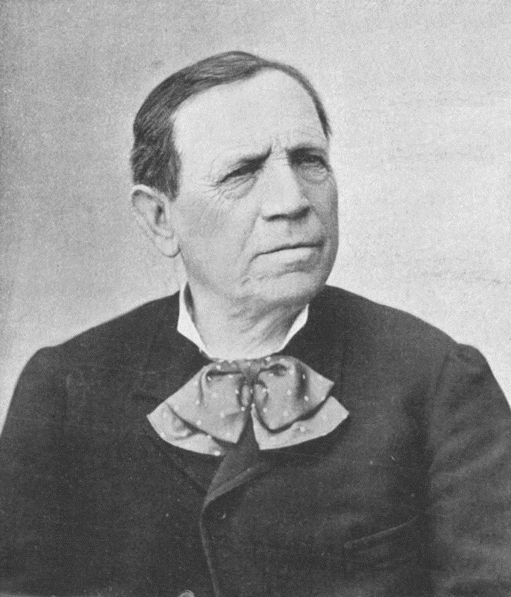 "M. Ruel, conseiller municipal de Paris".